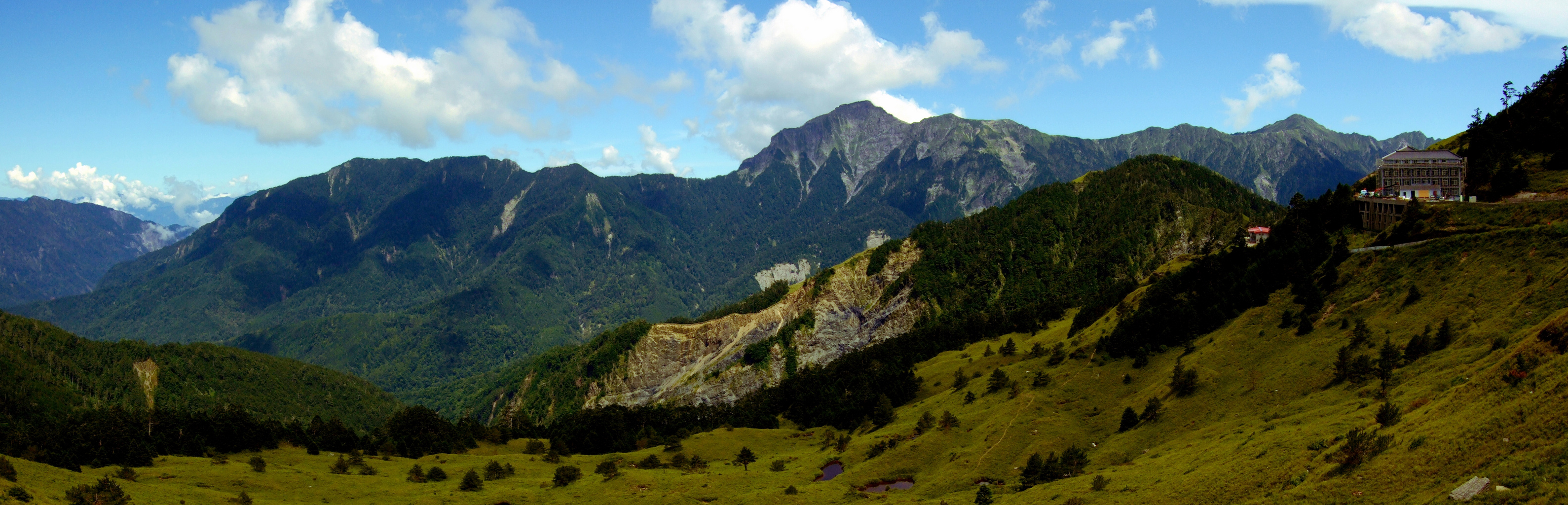 從合歡山拍攝的奇萊連峰與松雪樓 Bân-lâm-gú: Tsîng Ha̍p-huan-suann phah-liap ê Kî-lâi-liân-hong í Siông-suat-lâu